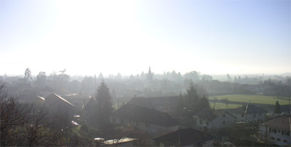 La ville de Le Grand-Lemps (38-Isère). Photo prise sur les hauteurs de la ville depuis la route de la source du futeau.